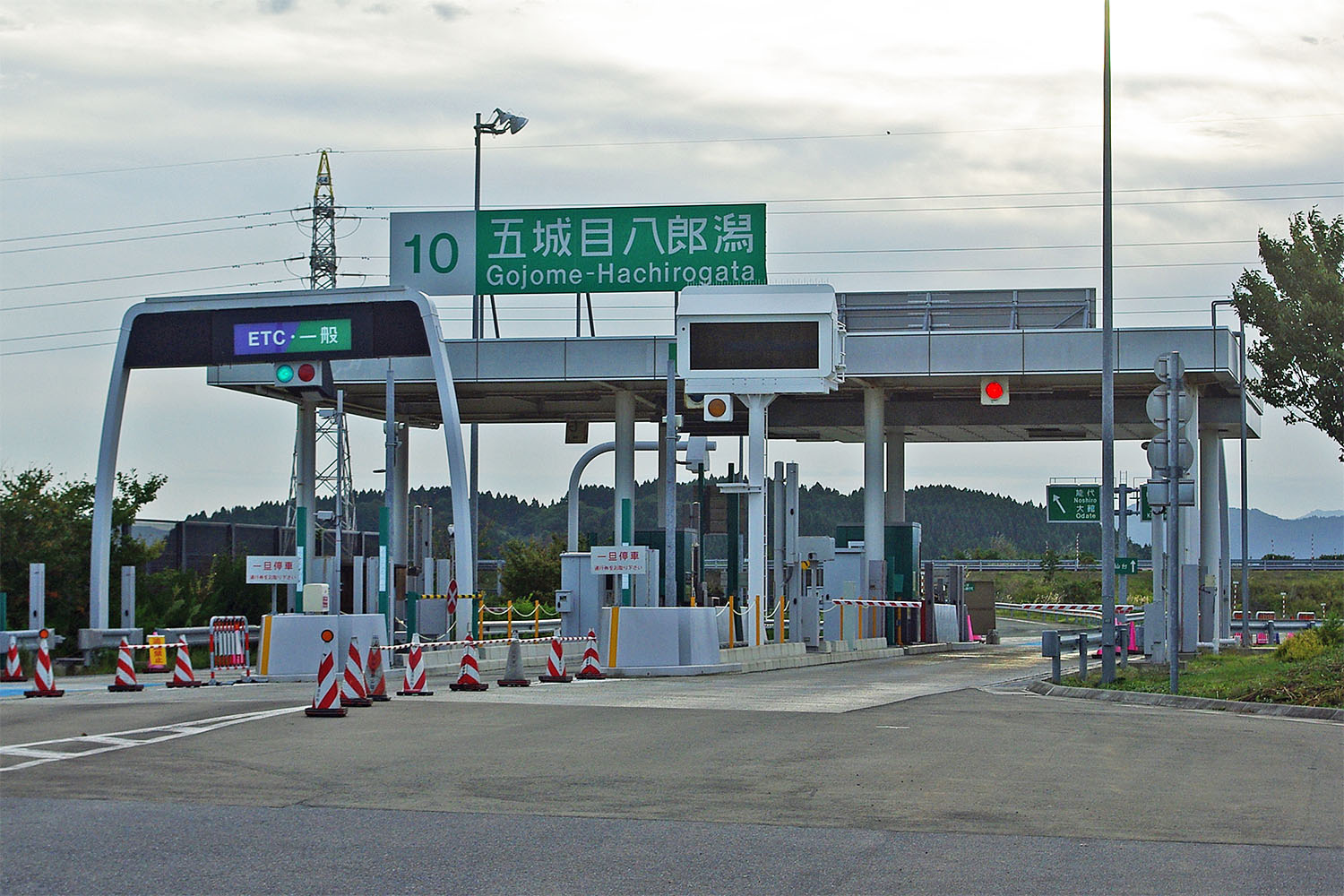 秋田自動車道 五城目八郎潟インターチェンジ